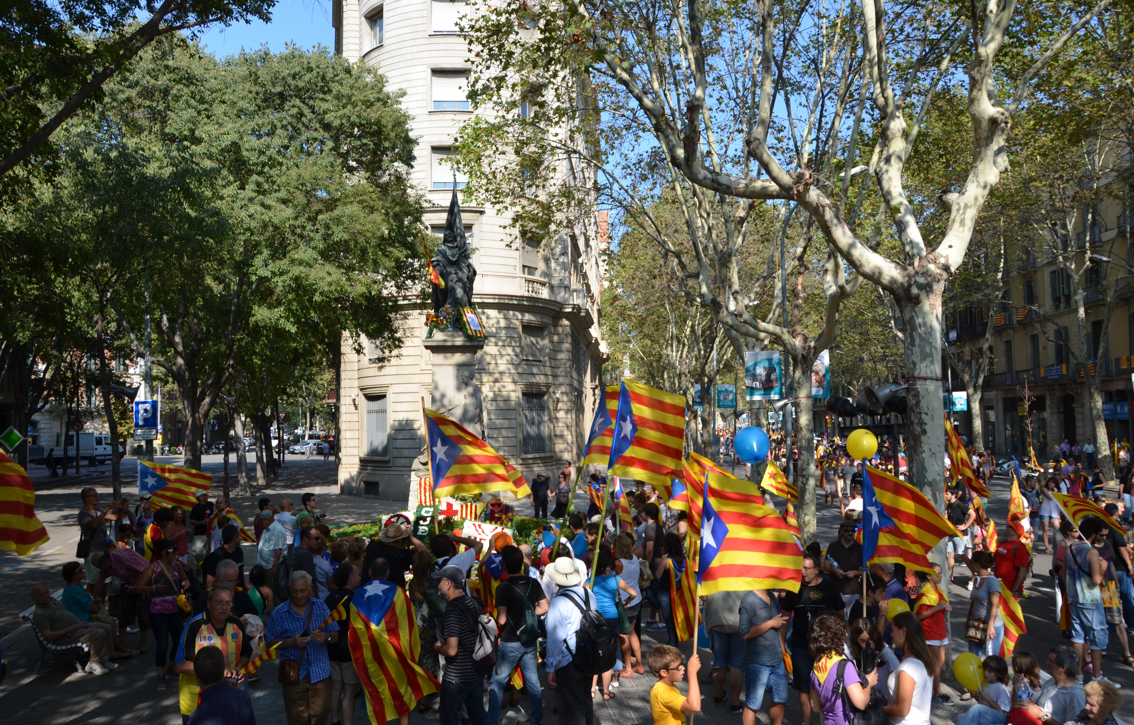 11s2012 Monument Rafael Casanova